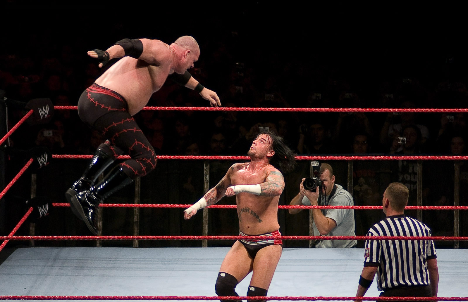 Presentación de la WWE en Santiago de Chile... al más puro estilo "Titanes del Ring" Foto: Alvaro Pruneda *No use esta foto sin mi autorización. *Don´t use this photo without my permission.